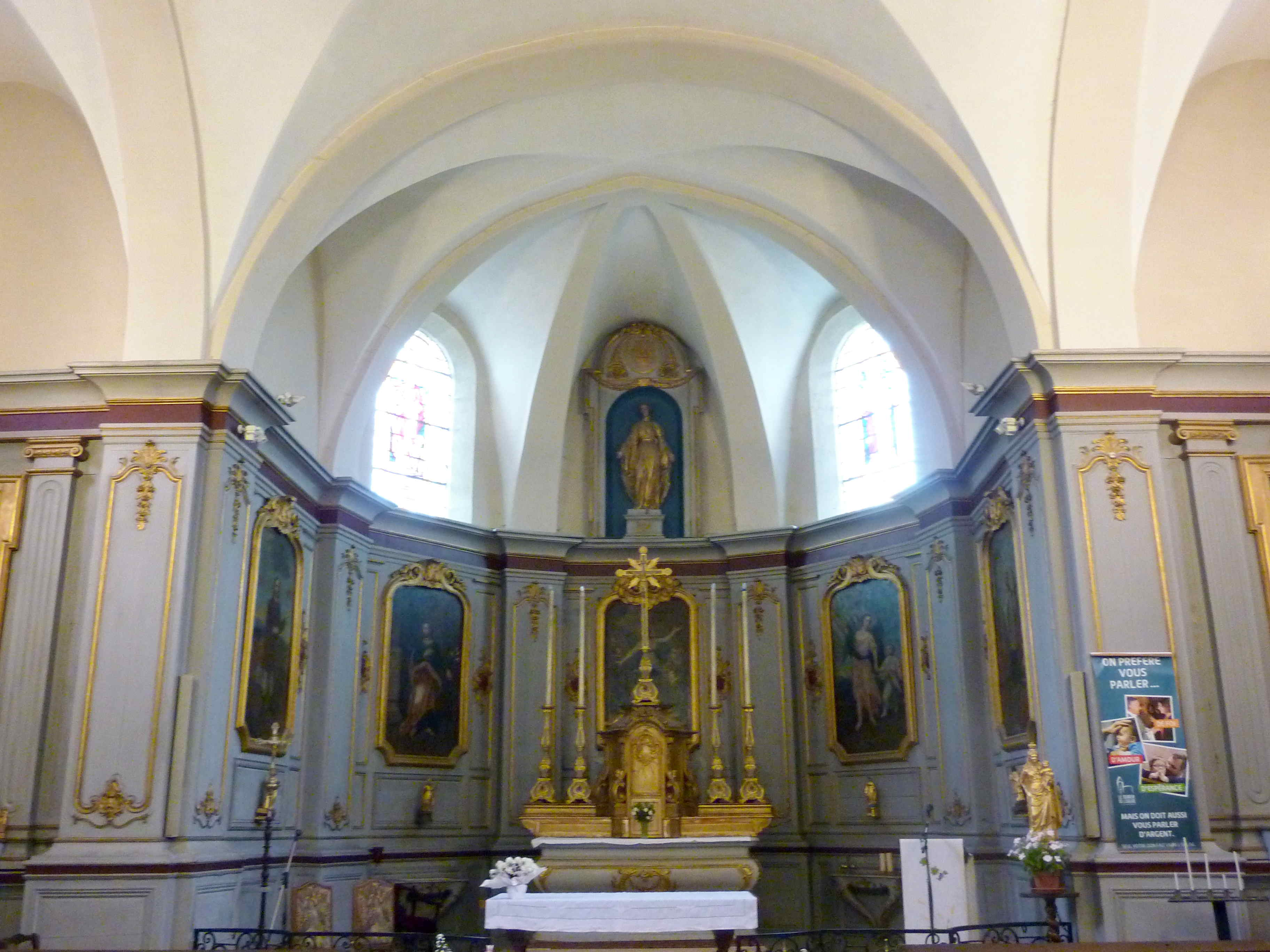 Église de l'Assomption (Mariä-Himmelfahrt-Kirche) in Combeaufontaine im Département Haute-Saône (Franche-Comté/Frankreich), Altarraum